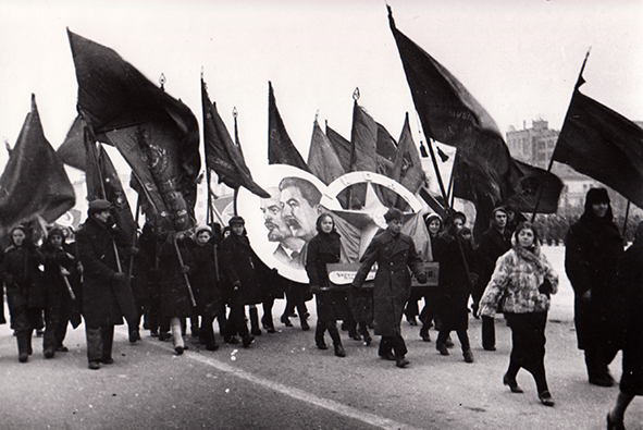 Гражданская демонстрация после прохождения парада. Куйбышев 7 ноября 1941 г.